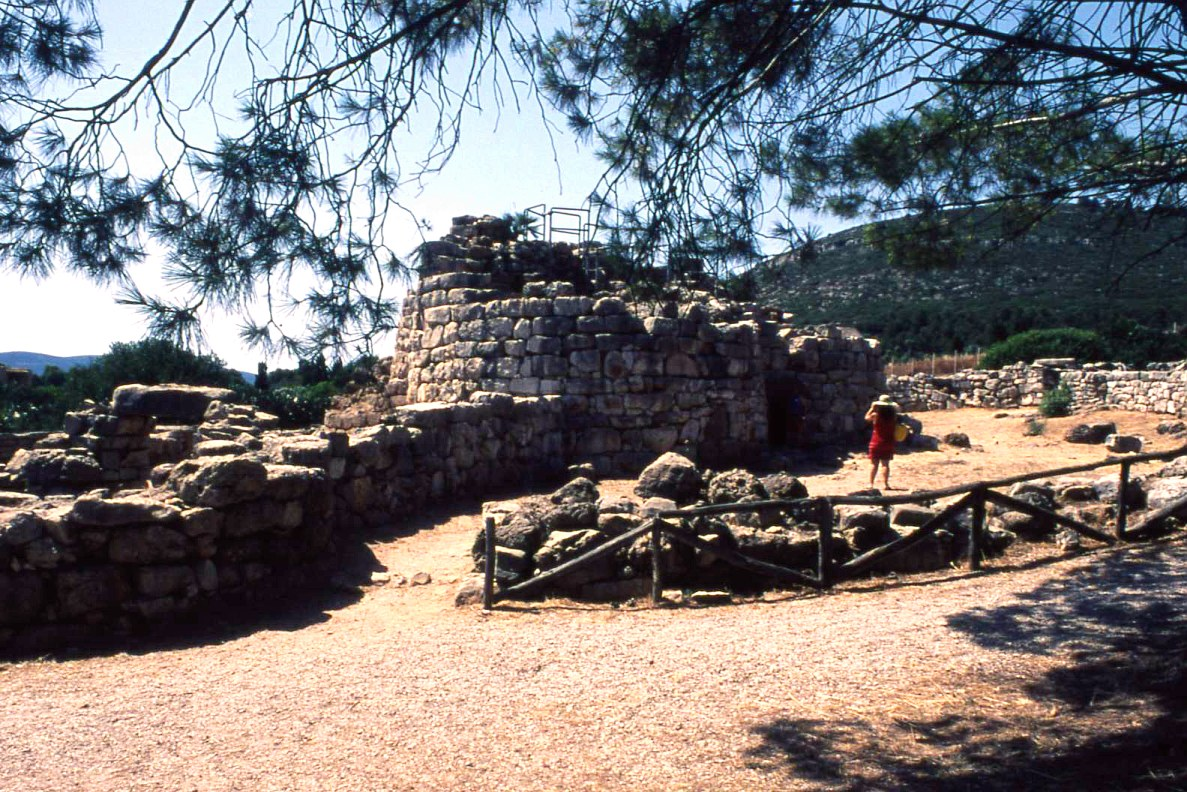 Sardinia, Nuraghe Palmavera